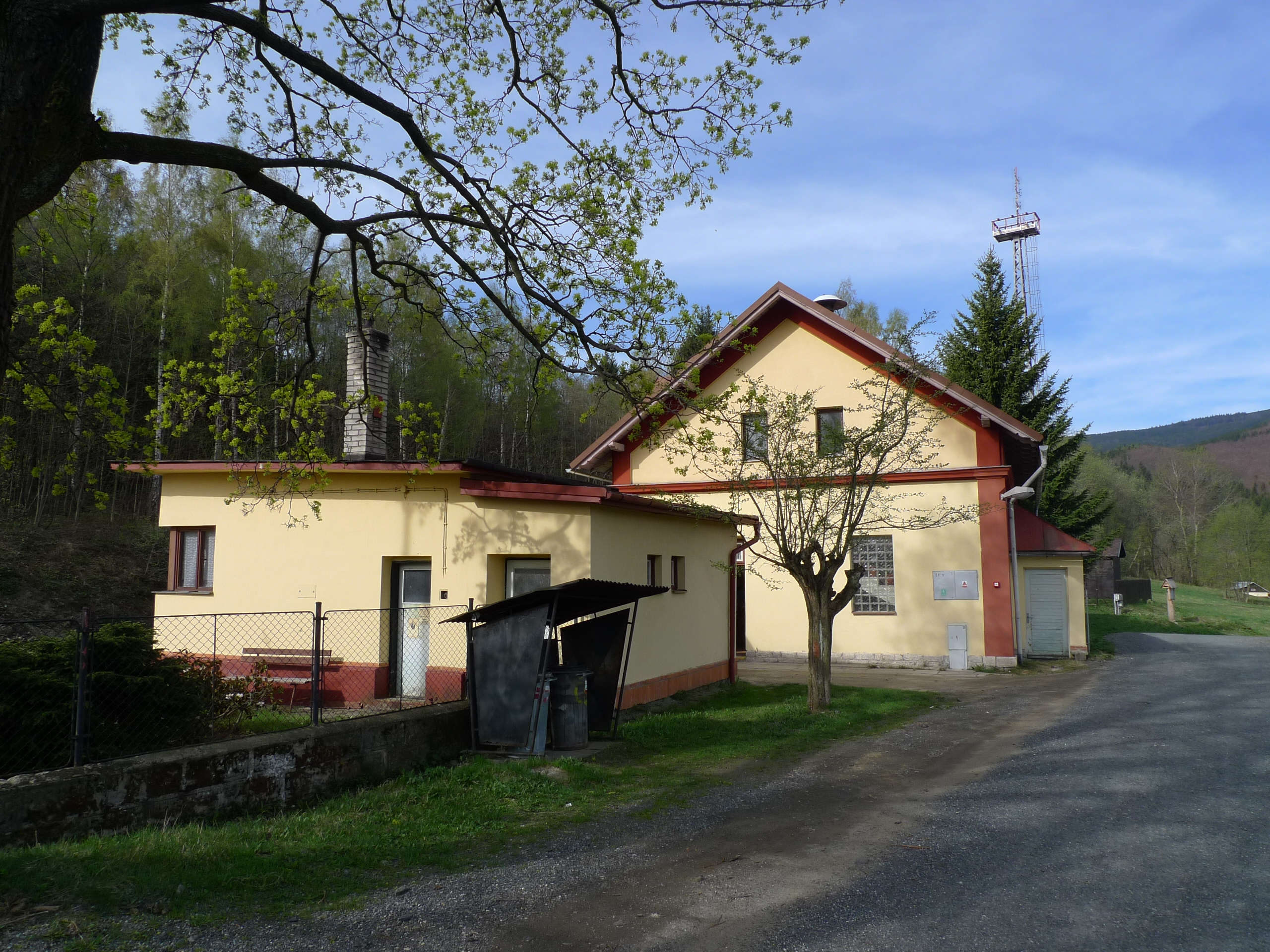 Nádraží v Horní Lipové